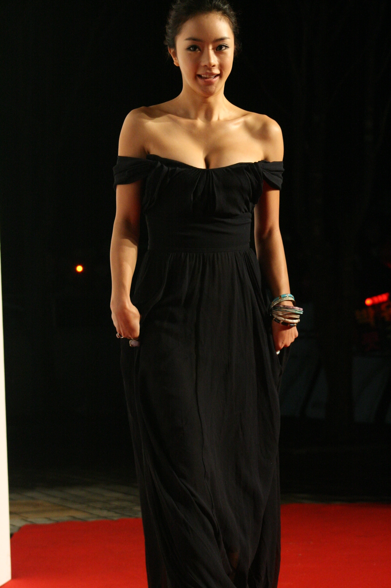 대한민국의 배우 서우